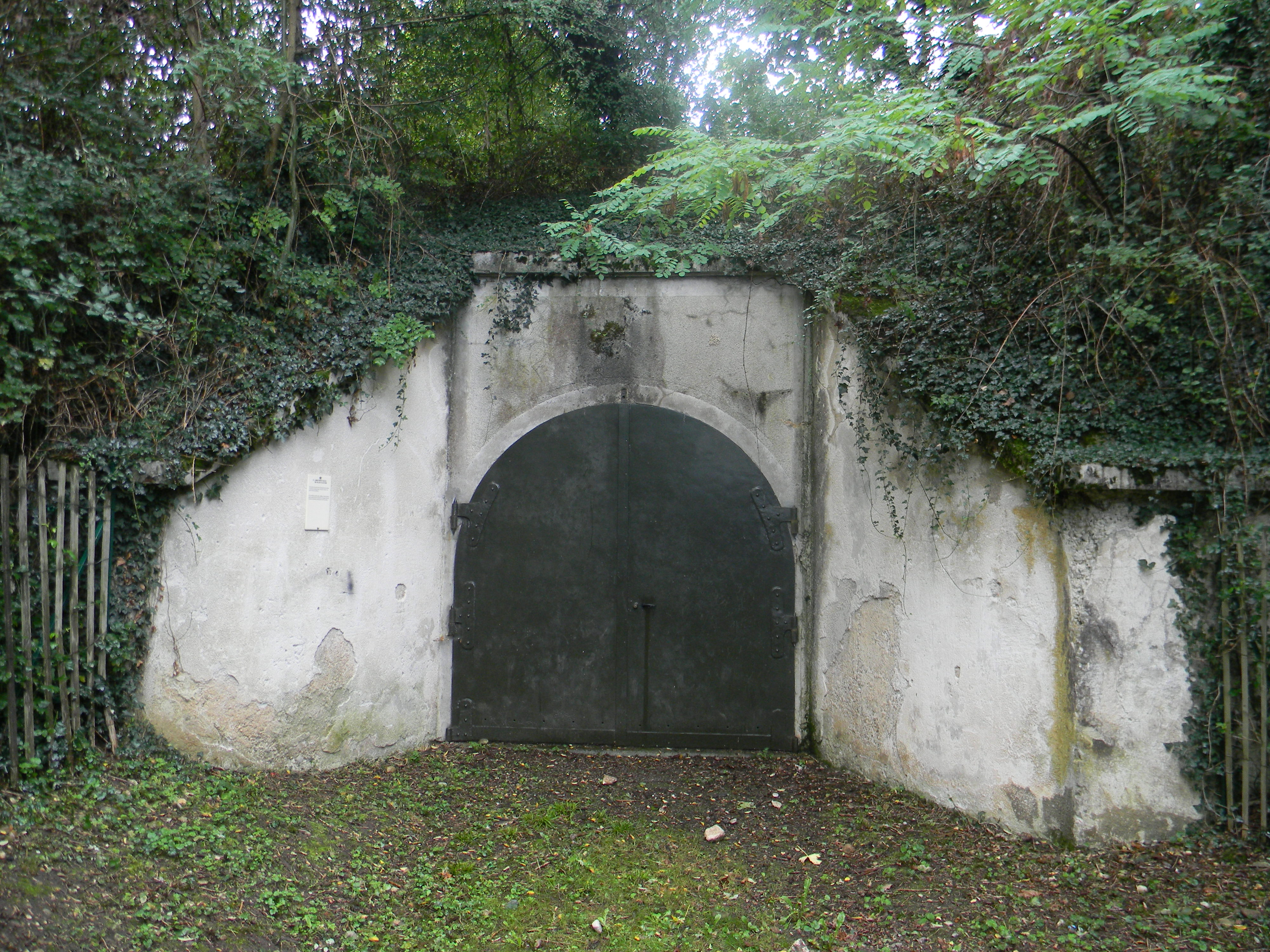 Abris sous talus de flanc gauche du Fort de Saint-Priest. Situé sur la crête de tir, il servait de stock pour les munitions pour approvisionner les pièces d'artillerie des cavaliers.